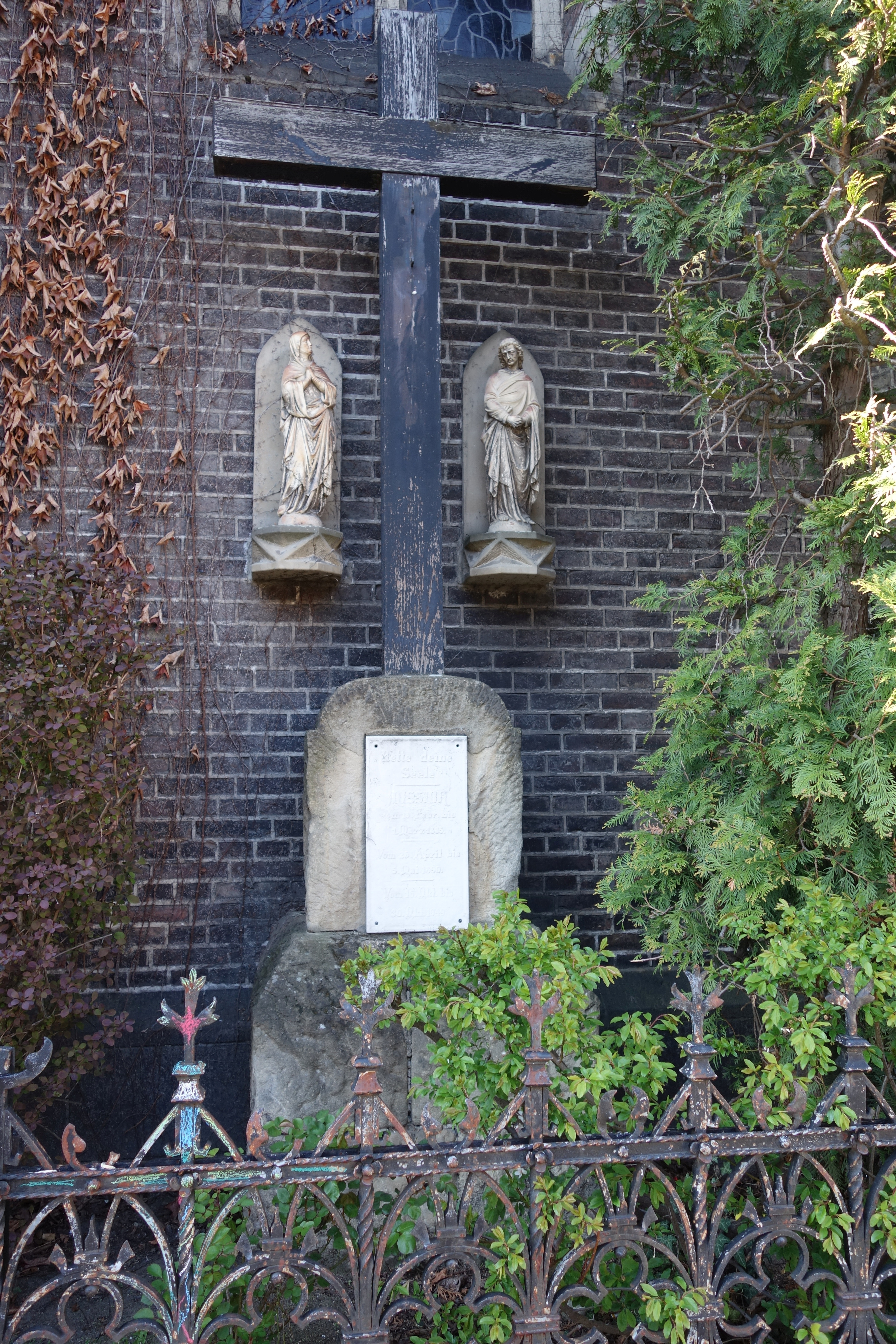 St. Josef, Düsseldorf-Oberbilk, März 2019 .